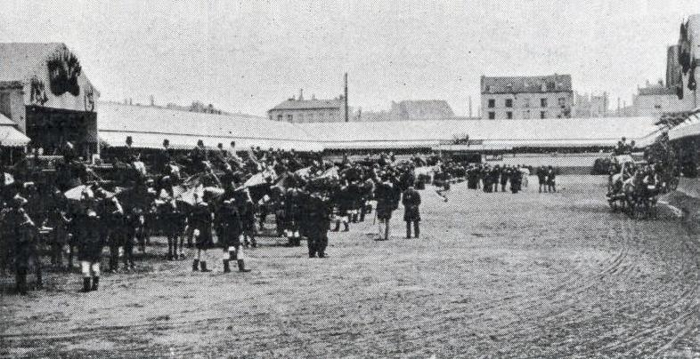 P360 : Les mails rangés sur la piste - Concours hippique international de 1900 / Jeux Olympiques de 1900